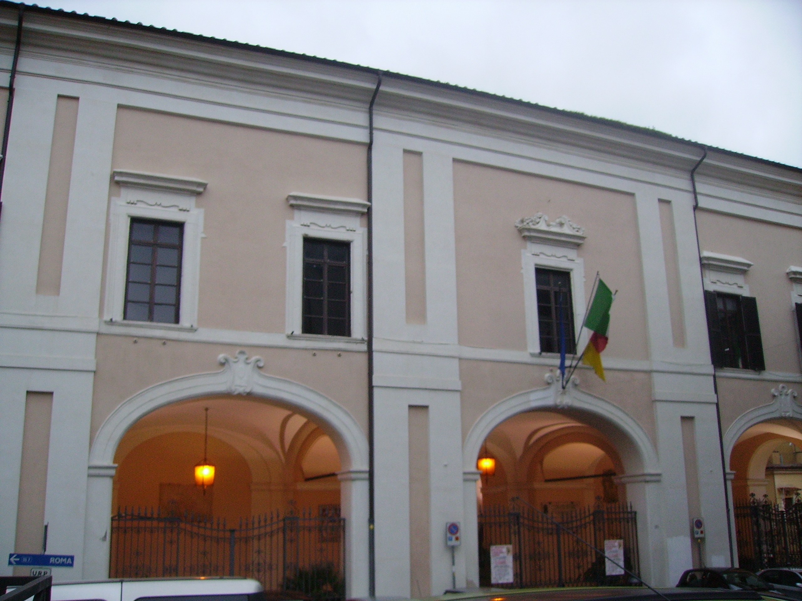 Albano Laziale - Palazzo Savelli